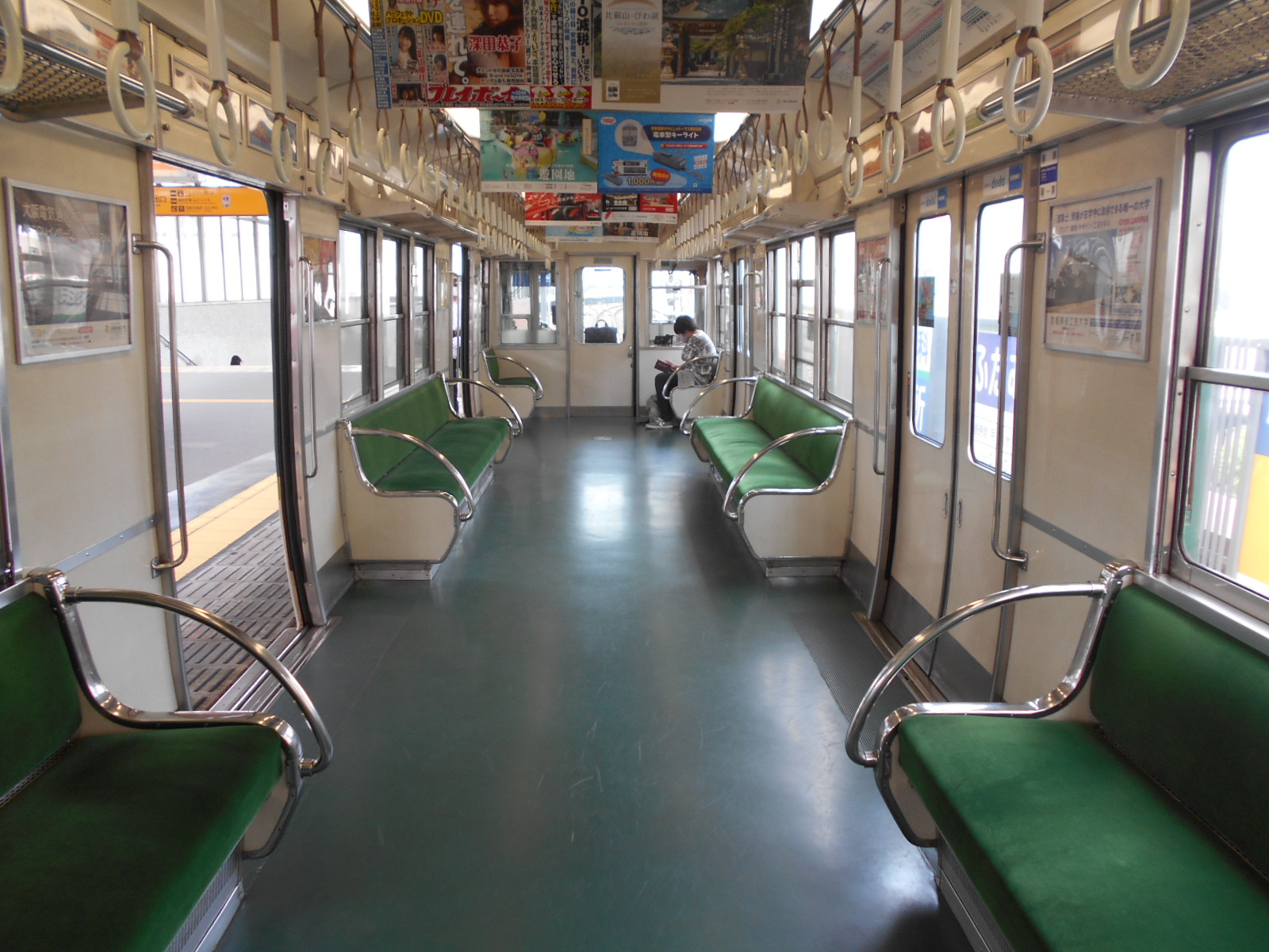 2454号車にて撮影